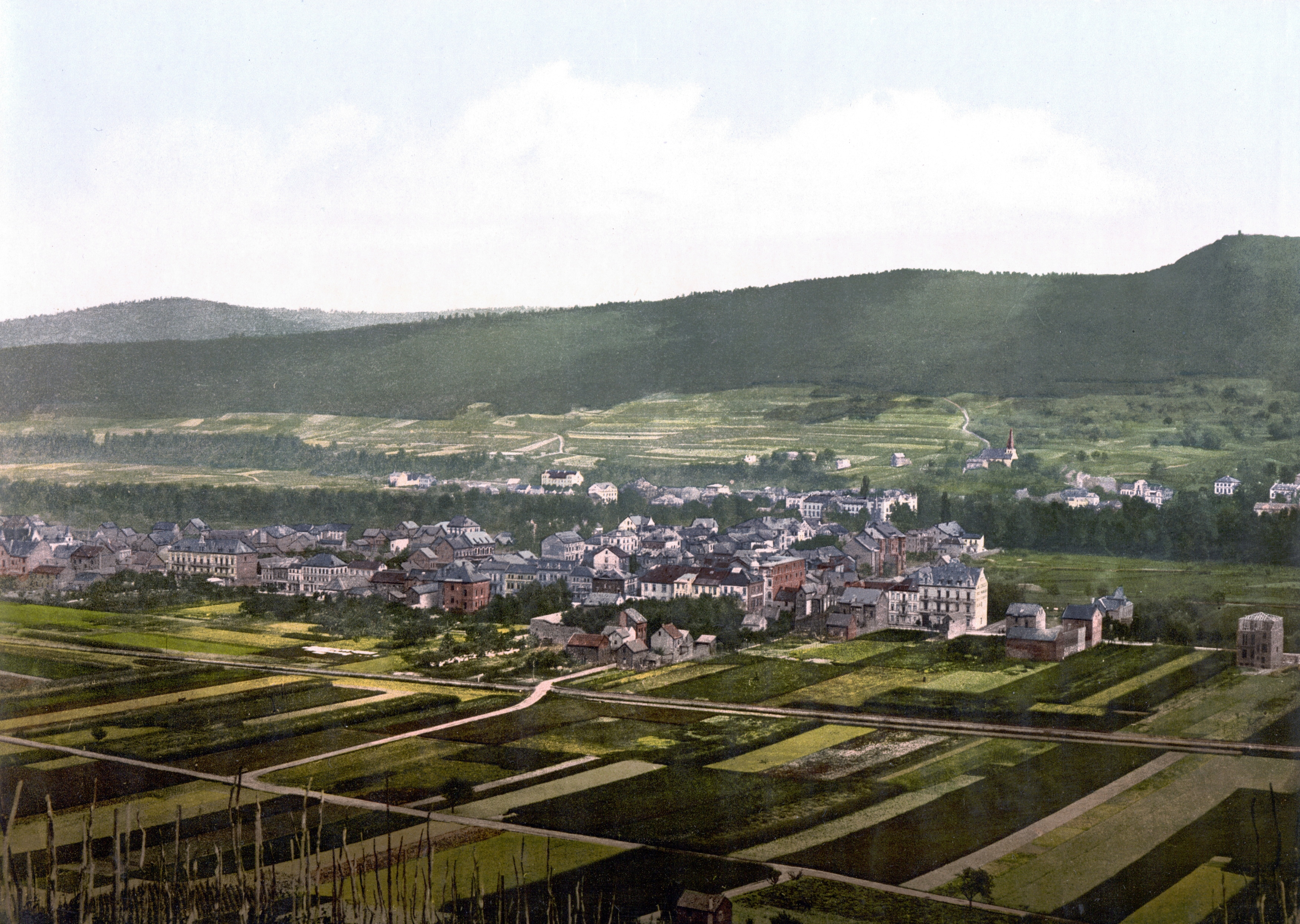 Bad Neuenahr